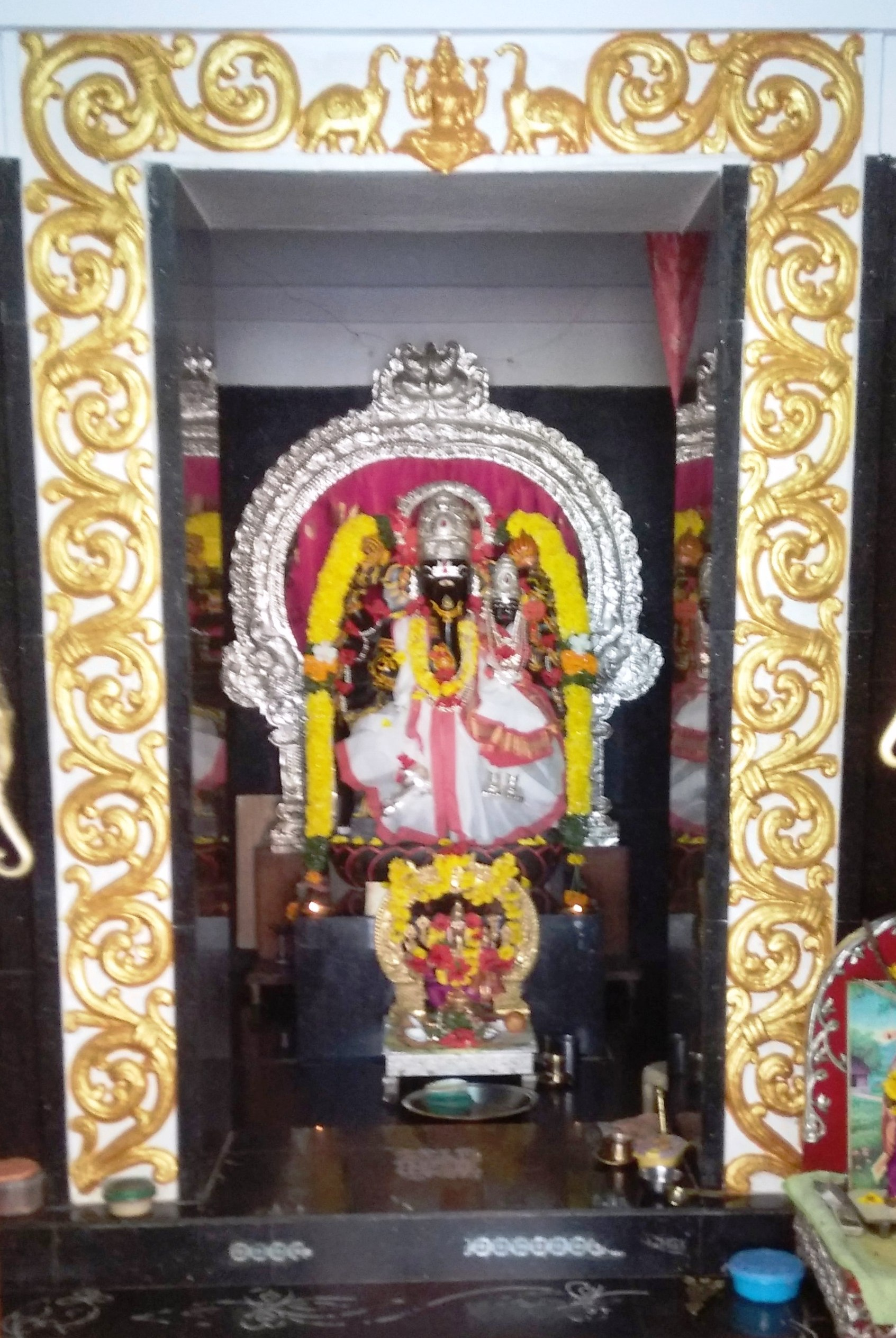 గణపతి